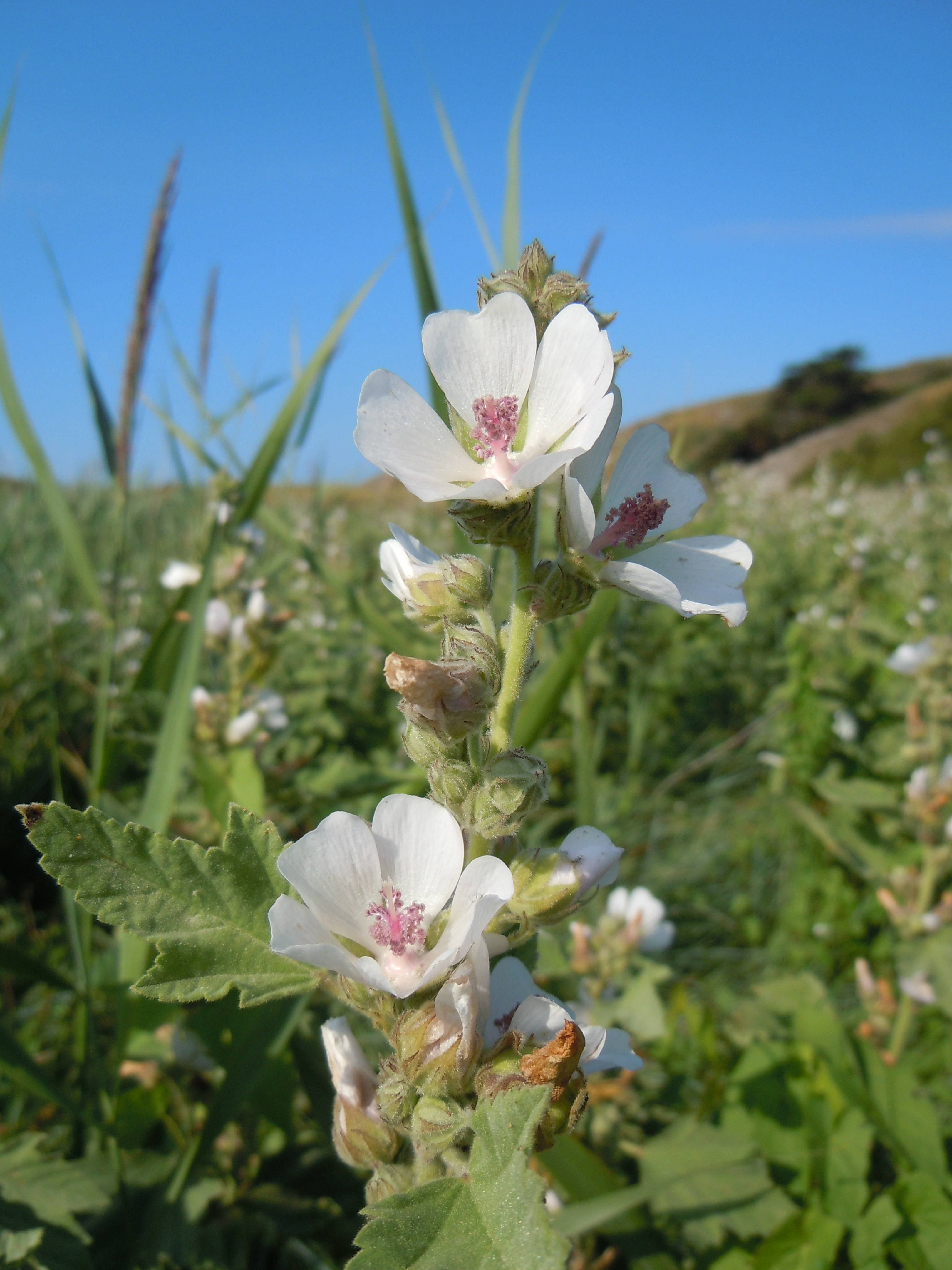 Guimauve officinale (Althaea officinalis) dans les prés salés de la plage de Donnant, Belle-Île-en-Mer